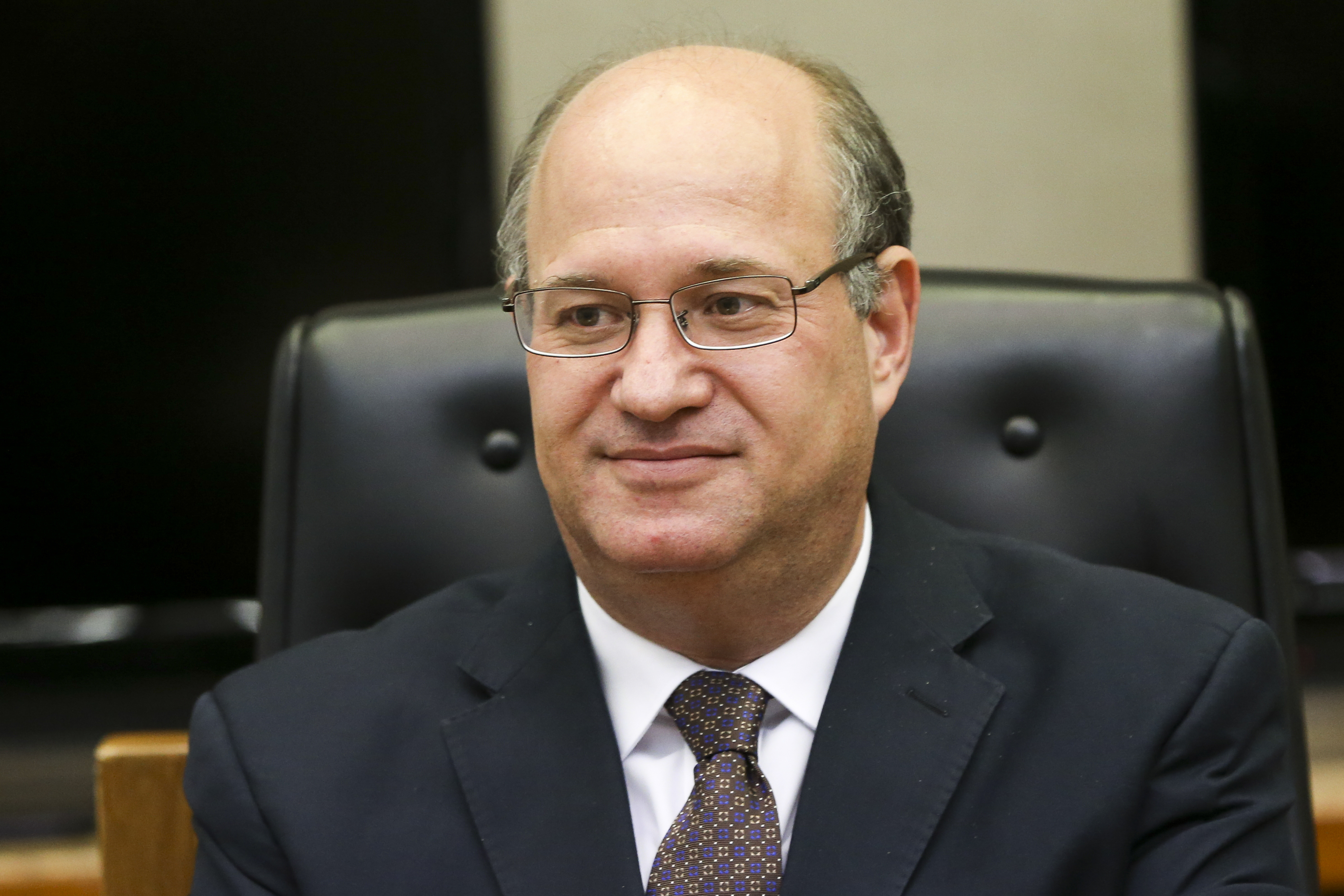 Brasília - O Presidente do Banco Central, Ilan Goldfajn durante a quinta reunião do ano do Comitê de Política Monetária (Copom) (Marcelo Camargo/Agência Brasil)